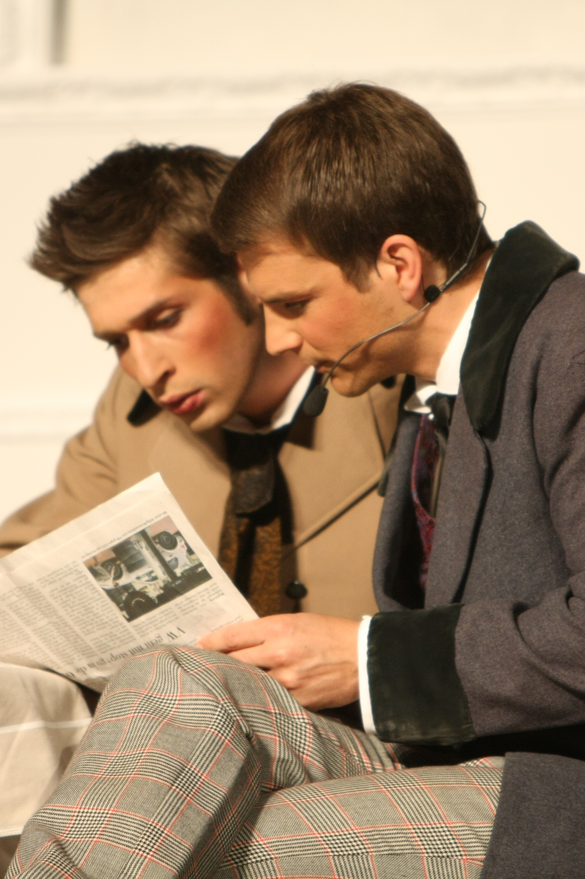 Schauspieler Igor Dolgatschew und Norman Kalle in dem Comedy Musical Die Lokalbahn von Thorsten Wszolek, sehr freu nach Ludwig Thoma, Mund Art Theater, Premiere 21. Juni 2008